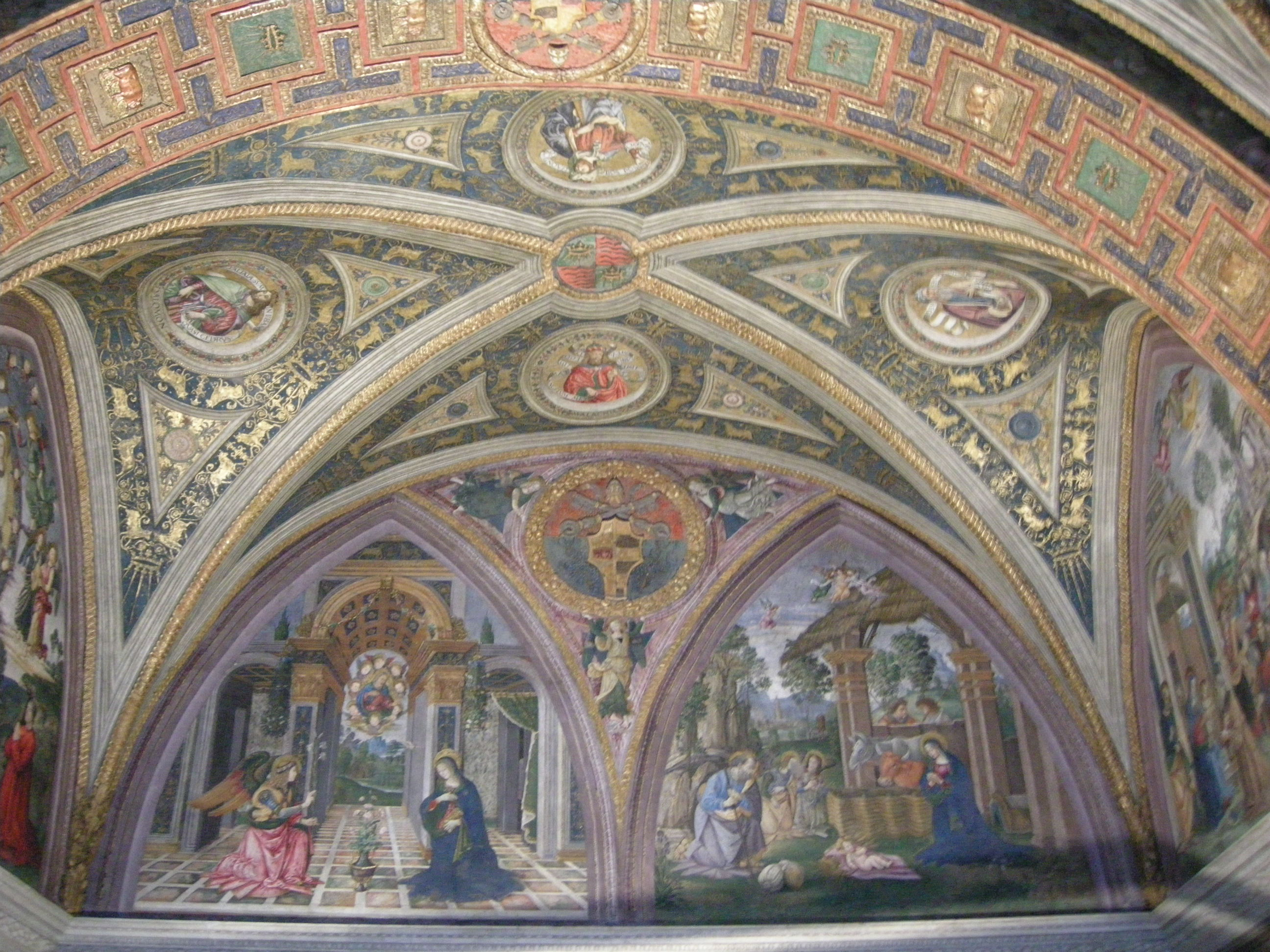 Appartamento borgia